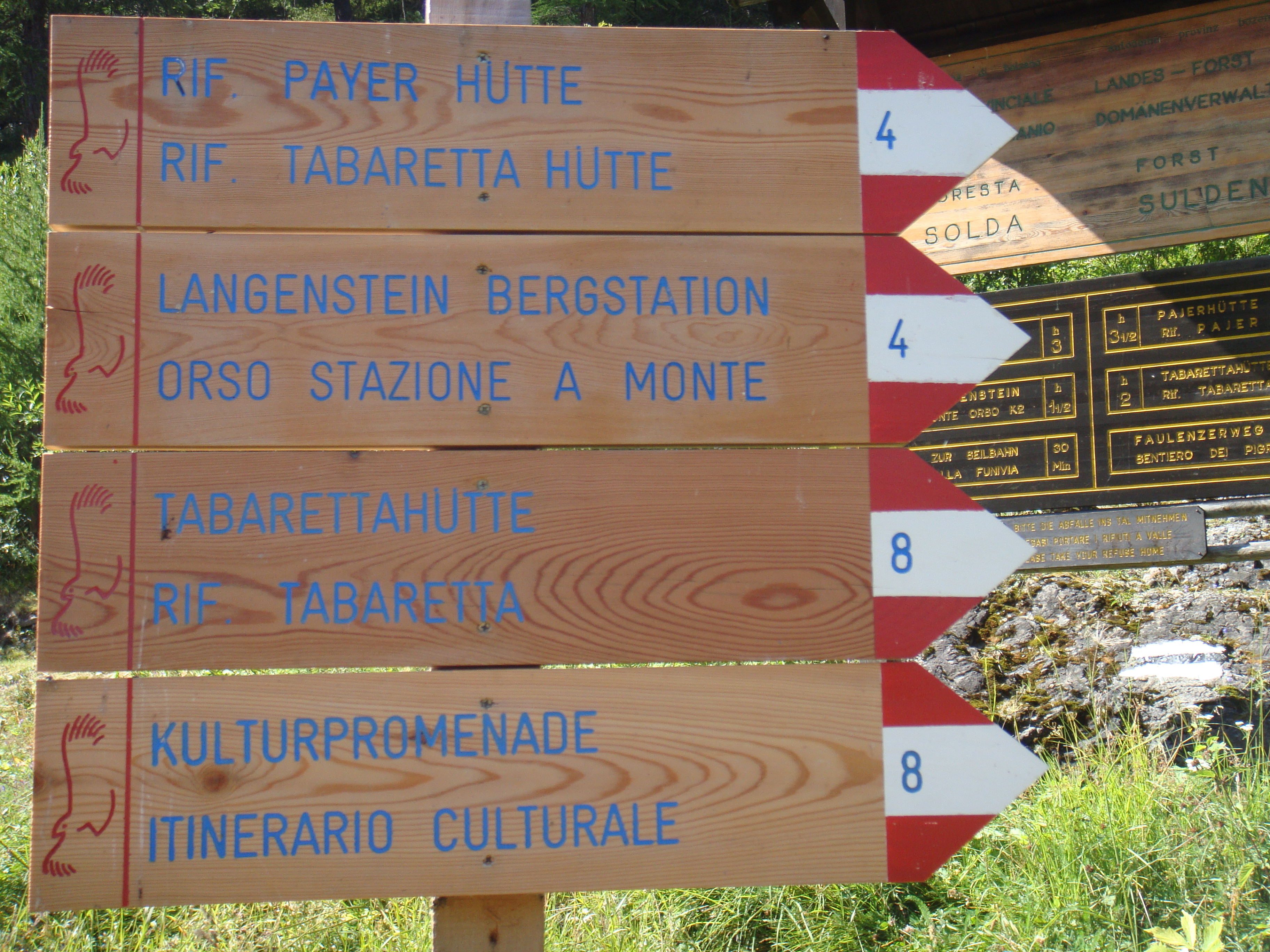 Cartelli indicatori dei sentieri per i Rifugi Payer e Tabaretta. Solda/Sulden, Stelvio, Italia.